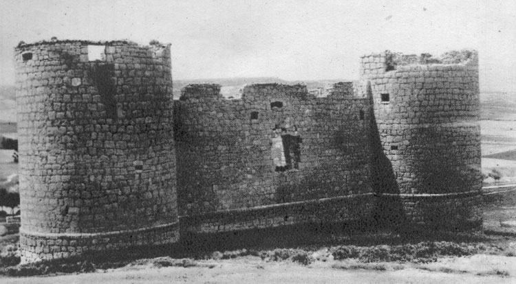 Castillo - Hornillos (Palencia) - España Turística y Monumental / Cuarto álbum / Las Bellezas de Castilla / Región Leonesa - Cromo 120 x 70 Sepia